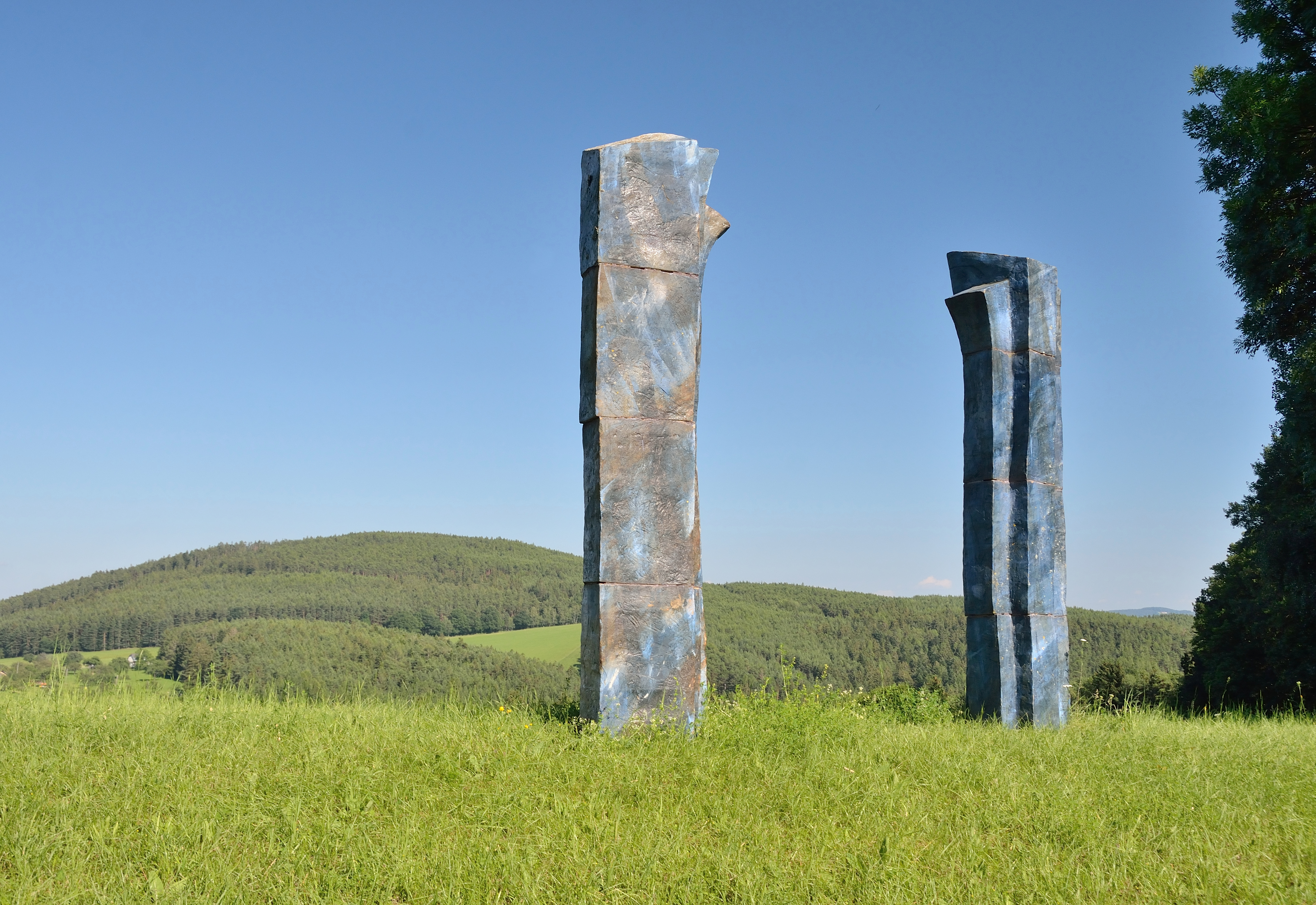 Charlotte + Johannes Seidl Blaues Wächtertor 1996, Skulptur im Freigelände von Gut Gasteil in Prigglitz.